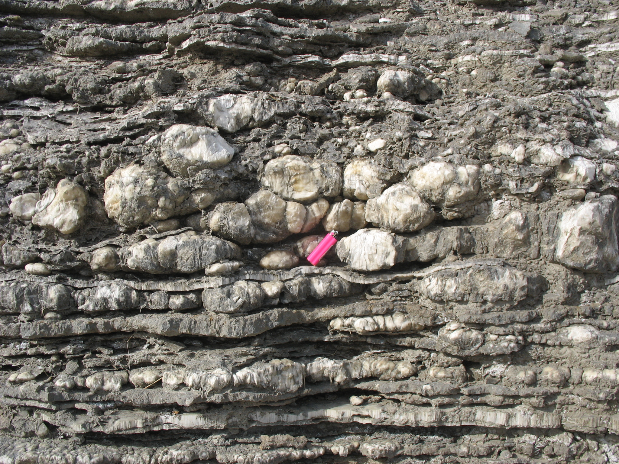 Formas diagenéticas de yeso laminar (fibroso) y nodular (alabastrino). Afloramiento junto al Hospital del Henares, Coslada, Comunidad de Madrid, España.